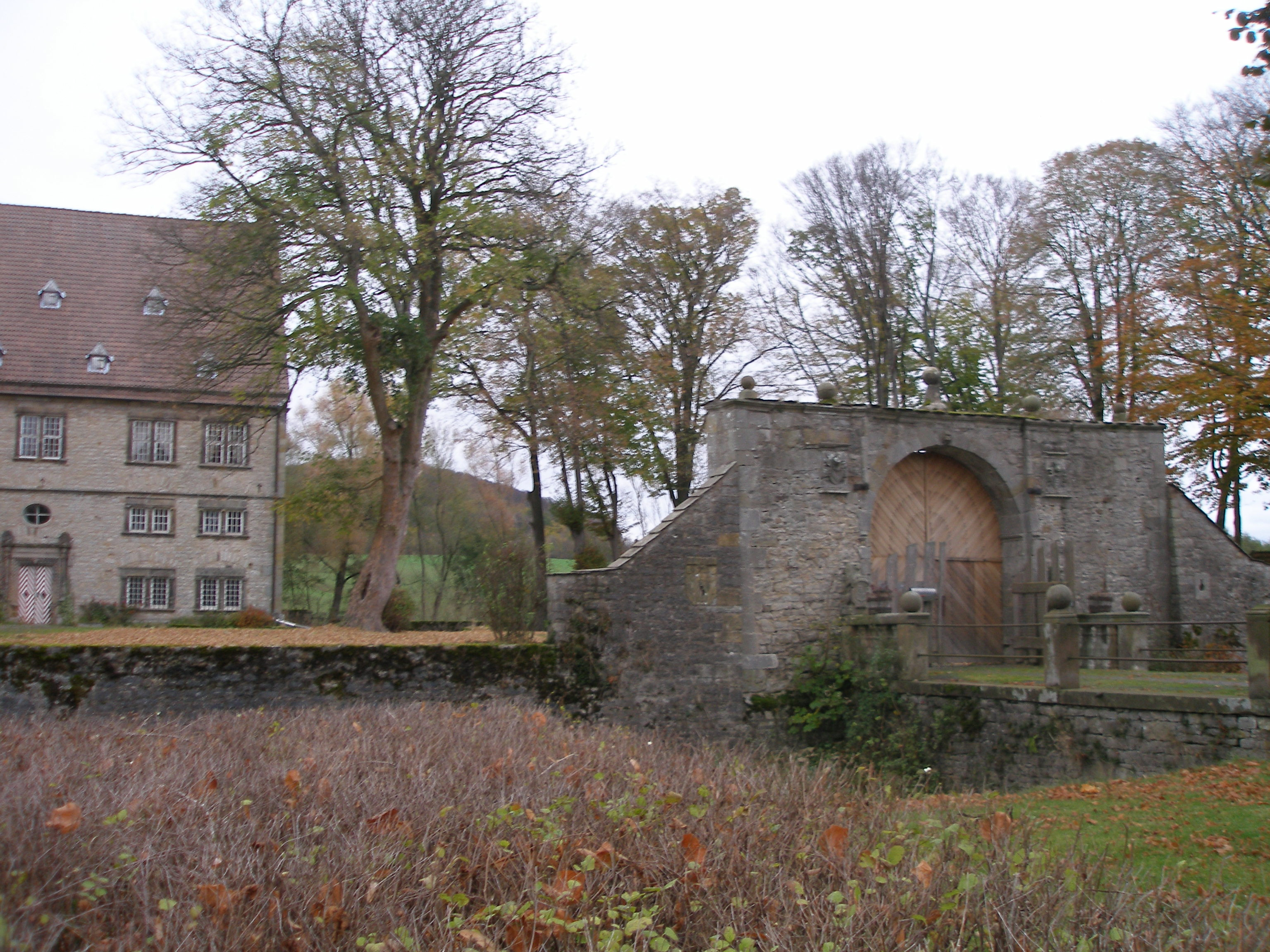 Schloss Thienhausen